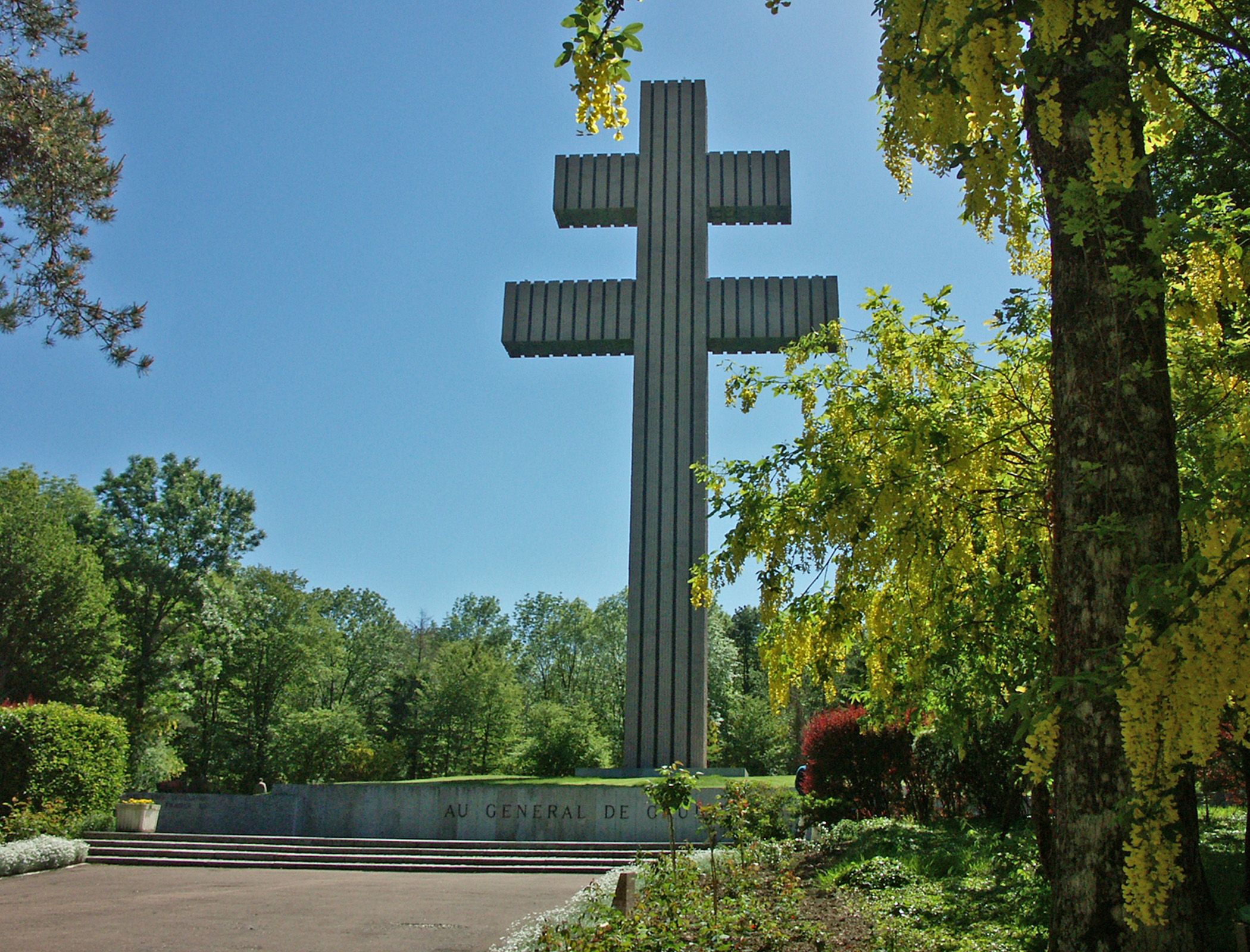 Colombey-les-Deux-Églises - Monument. Marc Nebinger et Michel Mosser architectes, inauguré en 1972.